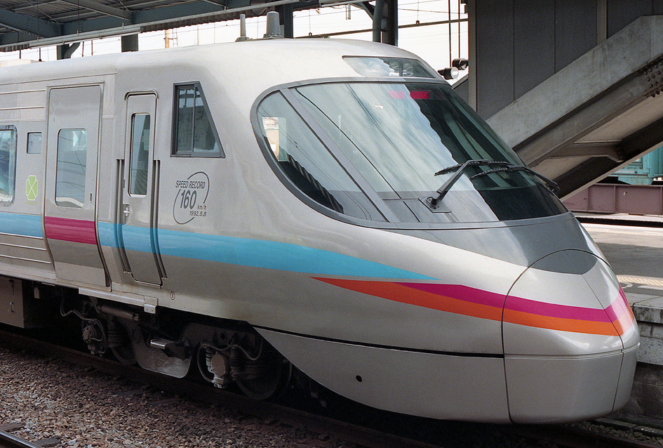 JR四国 8000系特急形電車 8001 160km/hのマーク